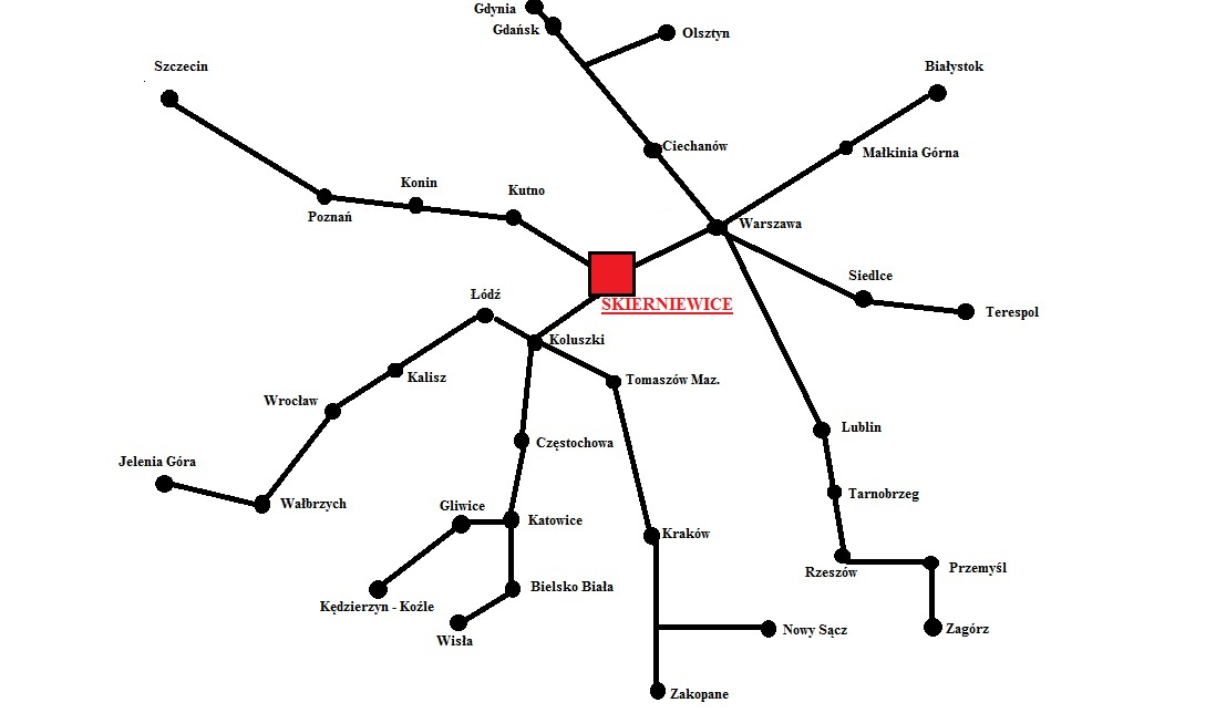 Schemat połączeń ze stacji Skierniewice